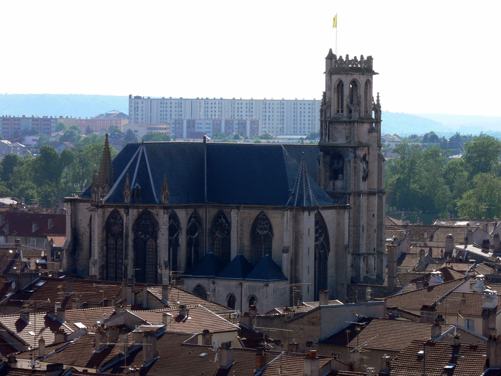 Collégiale Saint-gengoulf de Toul, Lorraine, France